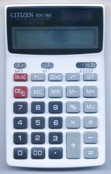 Kalkulator biurowy Citizen SDC-362.